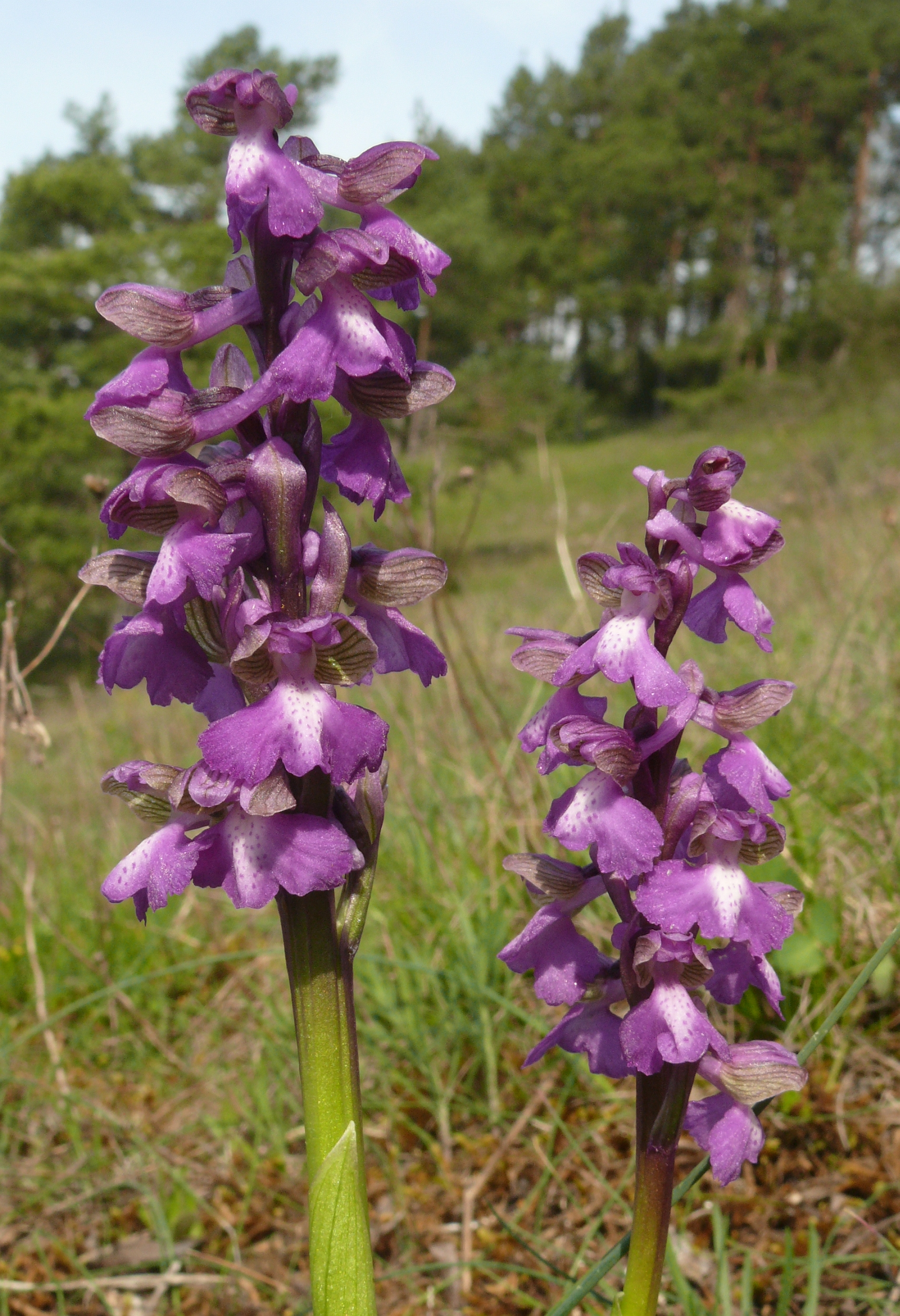 Orchis morio, Tauberland, Deutschland